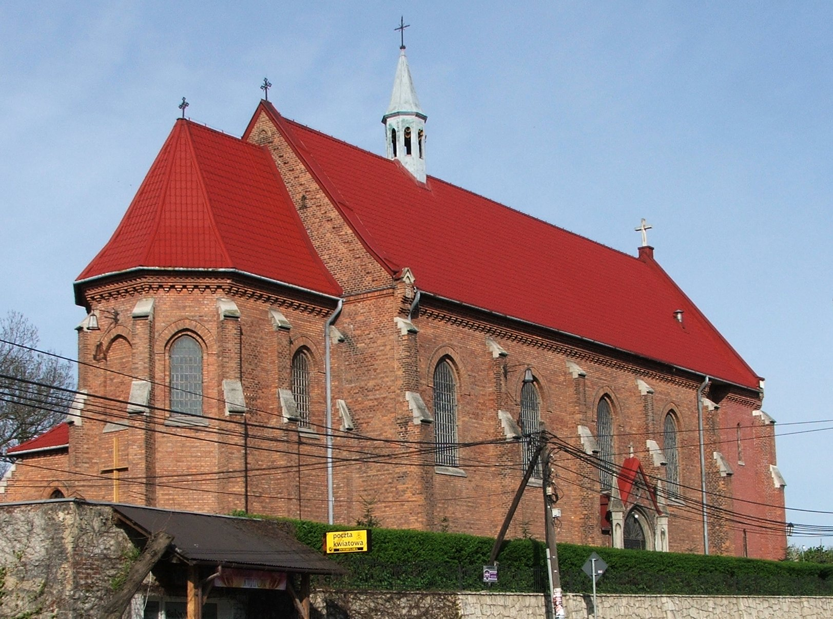 Zabierzów (województwo małopolskie)